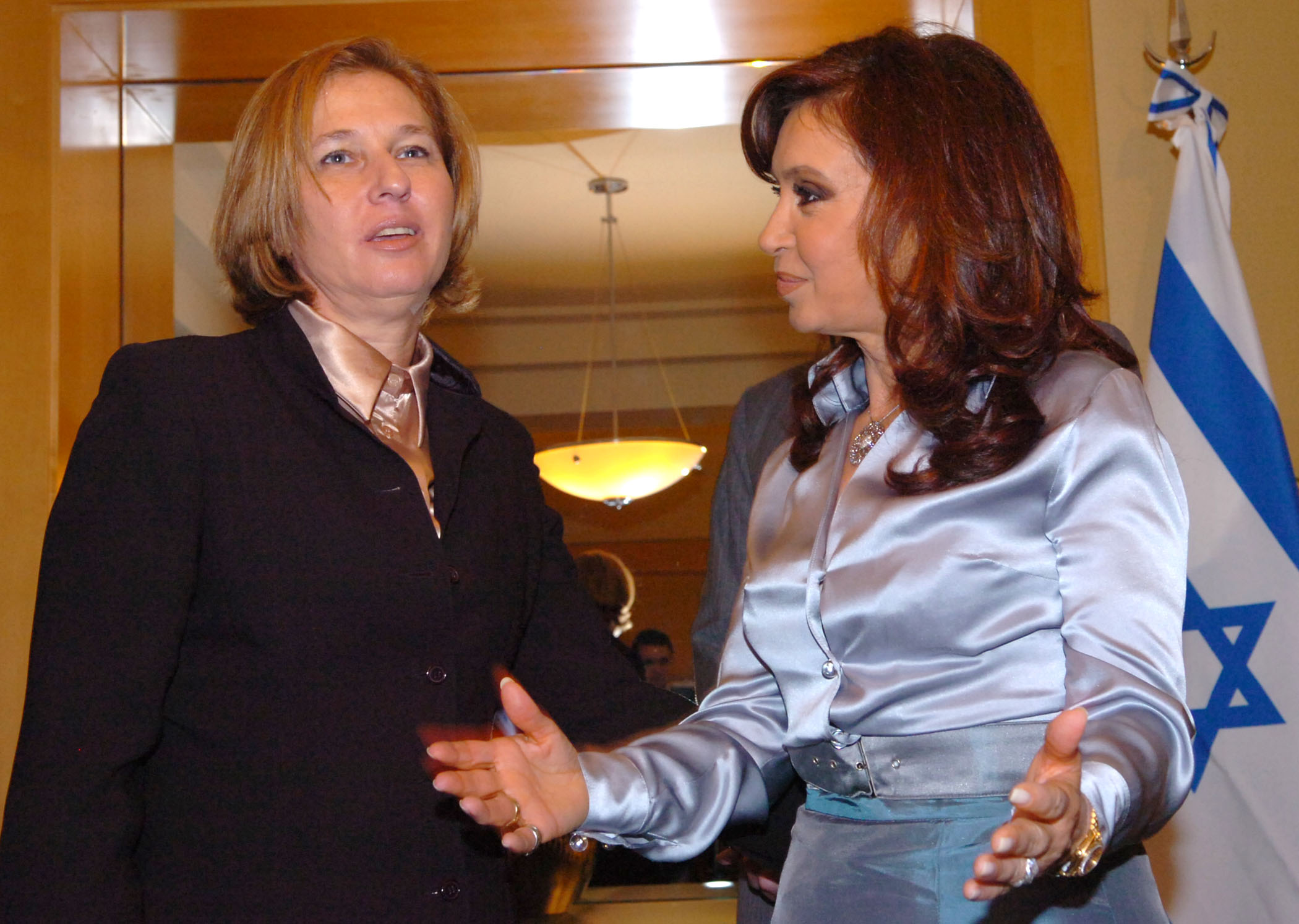 La doctora Cristina Fernández de Kirchner se reunió con la viceprimer ministro y canciller israelí, Tzipi Livni